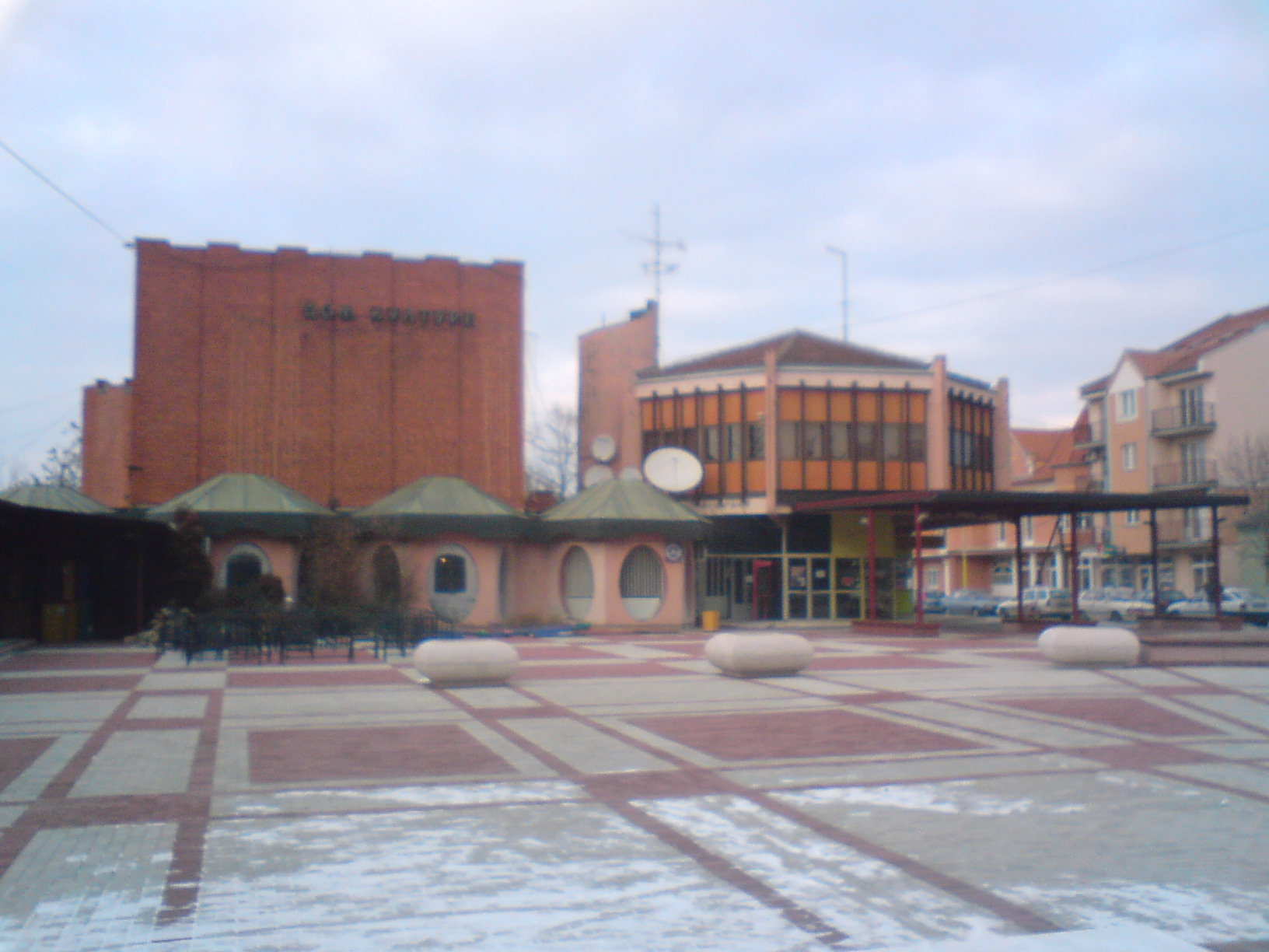 Дом културе „Доситеј Обрадовић“ у Баточини